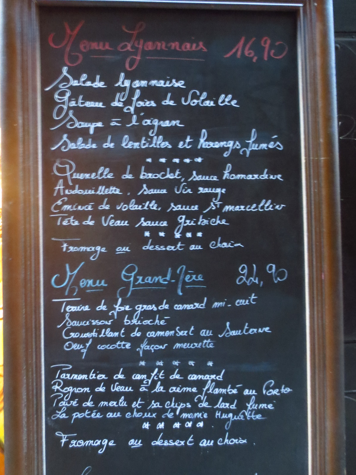 Saint-Jean (Lyon)